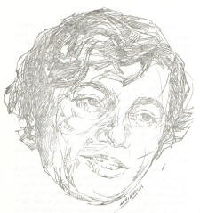 بورتريه للشهيد موسى شعيب